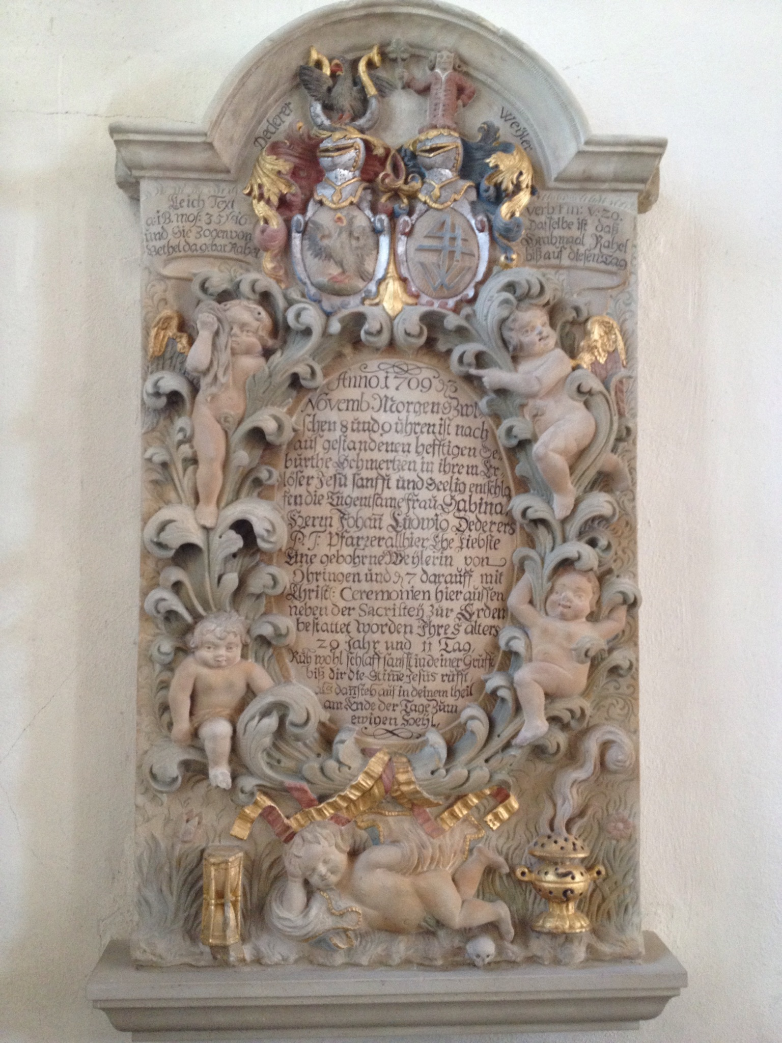 Interieur der Kirche in Baumerlenbach, Epitaph Sabina Dederer, geb. Weyler